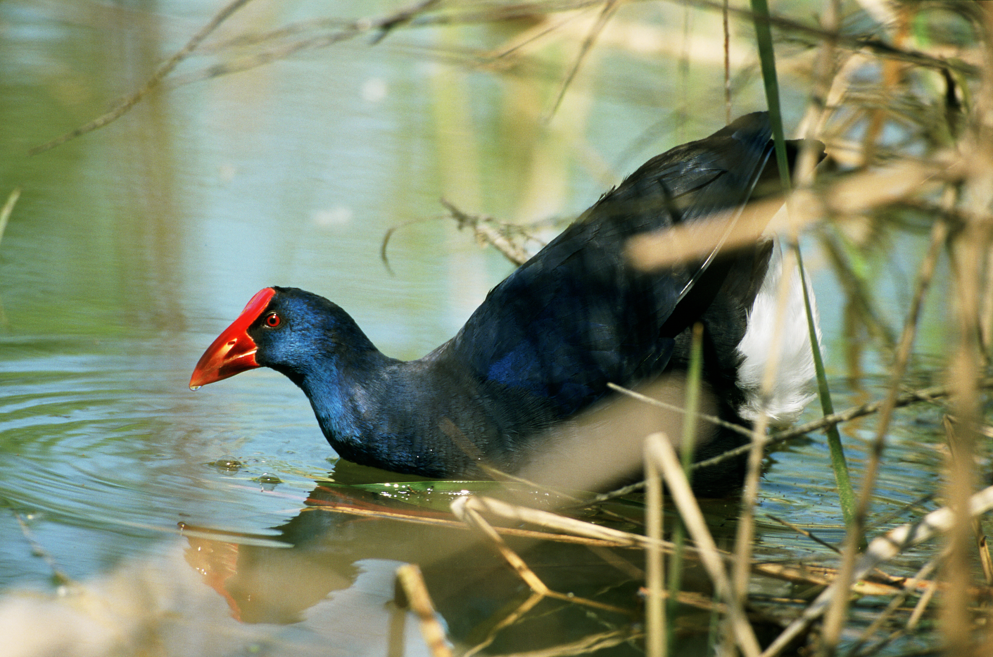 Calamón común Porphyrio porphyrio, Talavera de la Reina, España